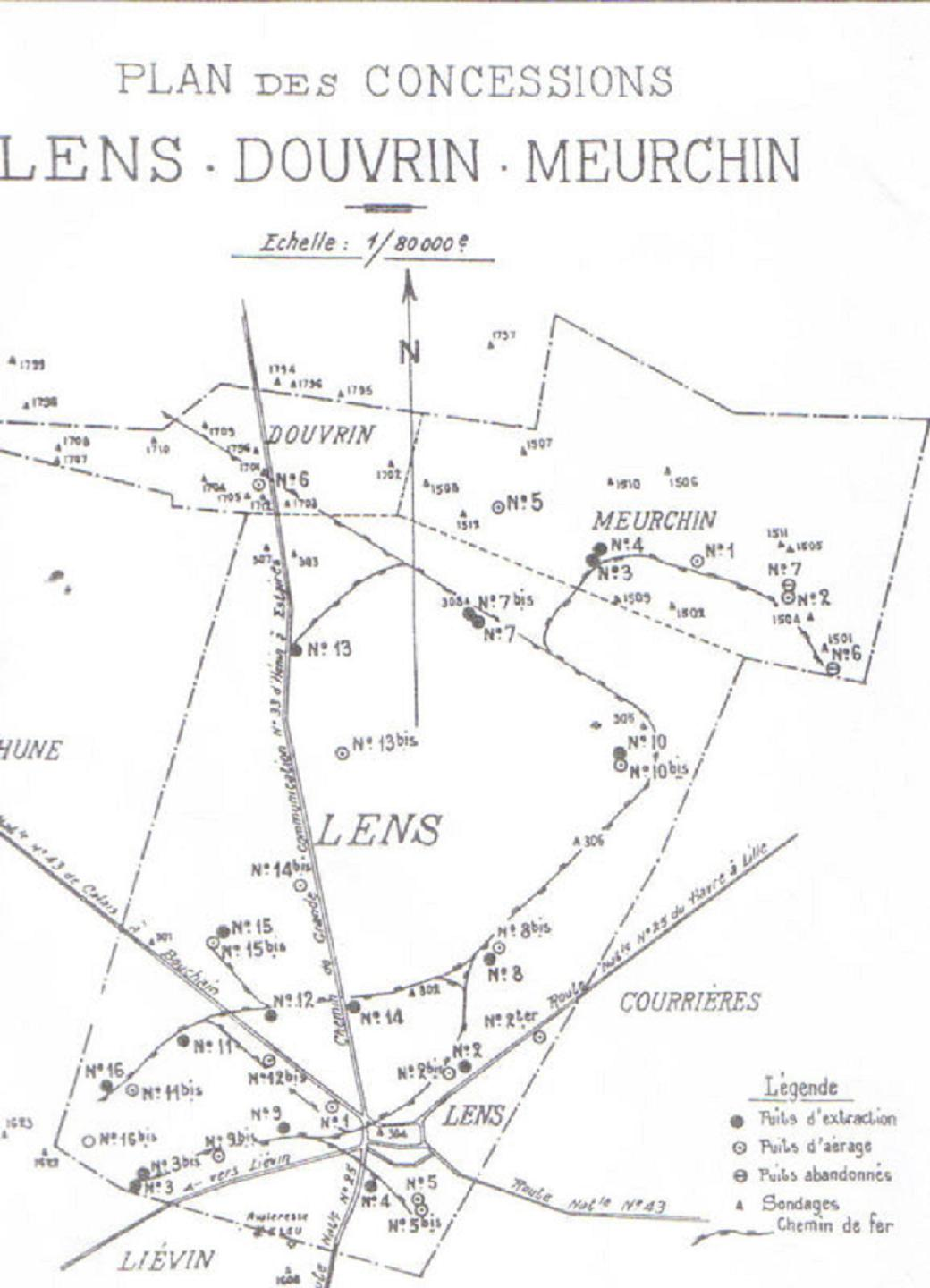 Compagnie des mines de Lens avec ses concessions rachetées avant 1940